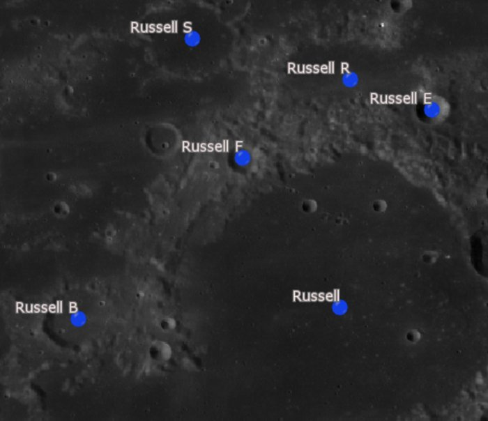 Cráter lunar Russell. Cráteres satélite. (Imagen LRO)